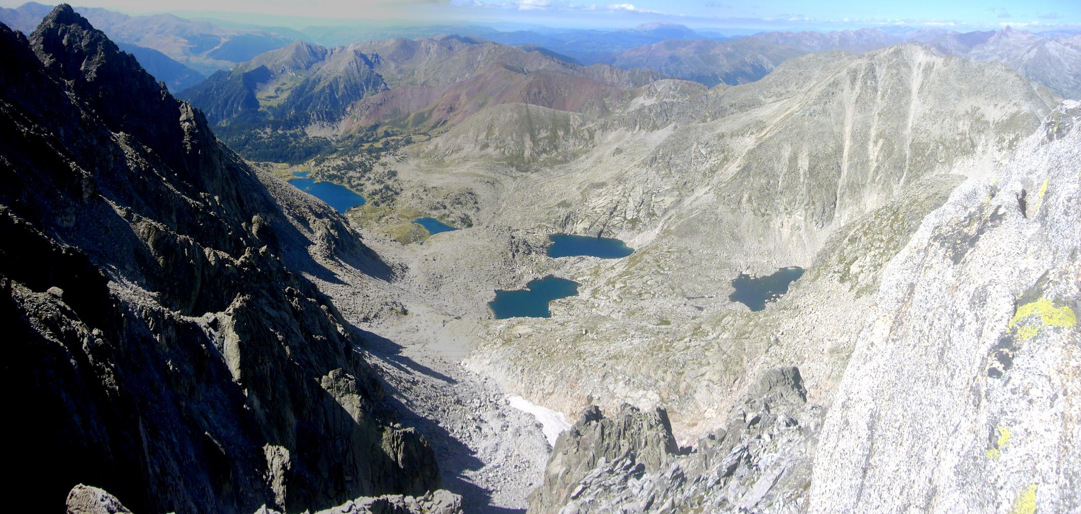 Estanys de Gémena vistos des de la cresta que uneix el Pic de Comoloforno y el Besiberri Sud; la Vall de Boí, Alta Ribagorça, Catalunya